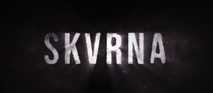 Jde o logo seriálu Skvrna, bylo mi dovoleno ho použít se svolením tvůrců tohoto seriálu